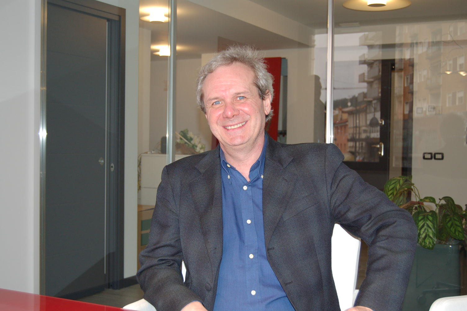 Giuliano Caputi